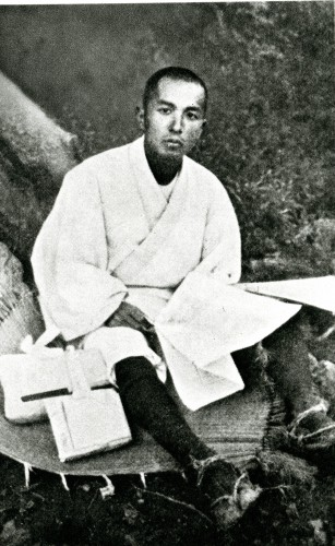 snagatsuka